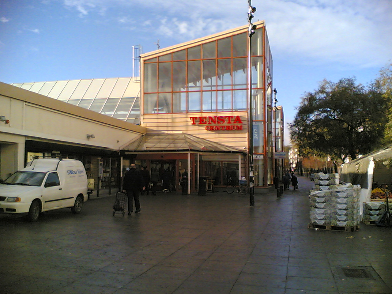 Tensta Centrum in Stockholm.